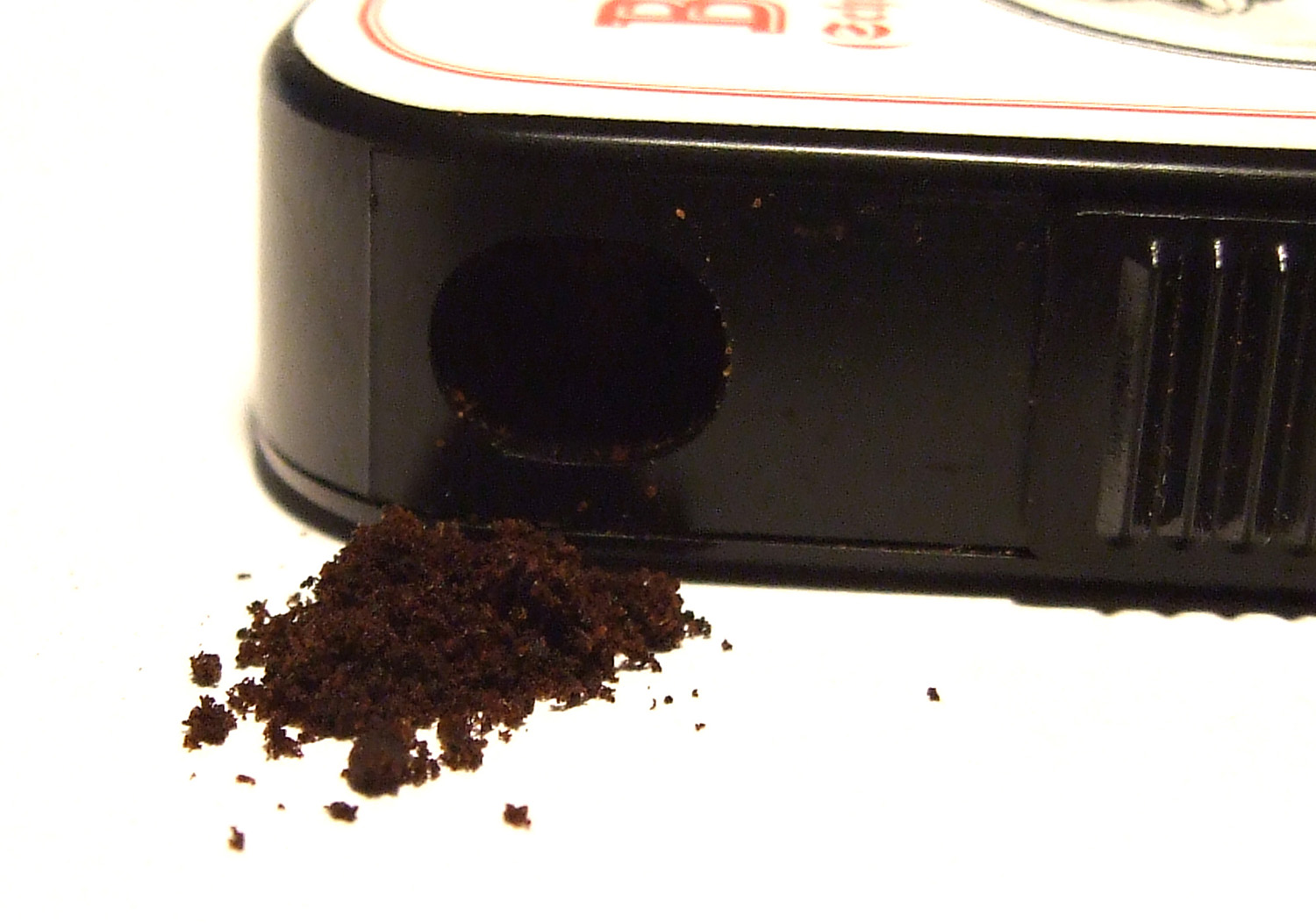 rozsypana tabaka